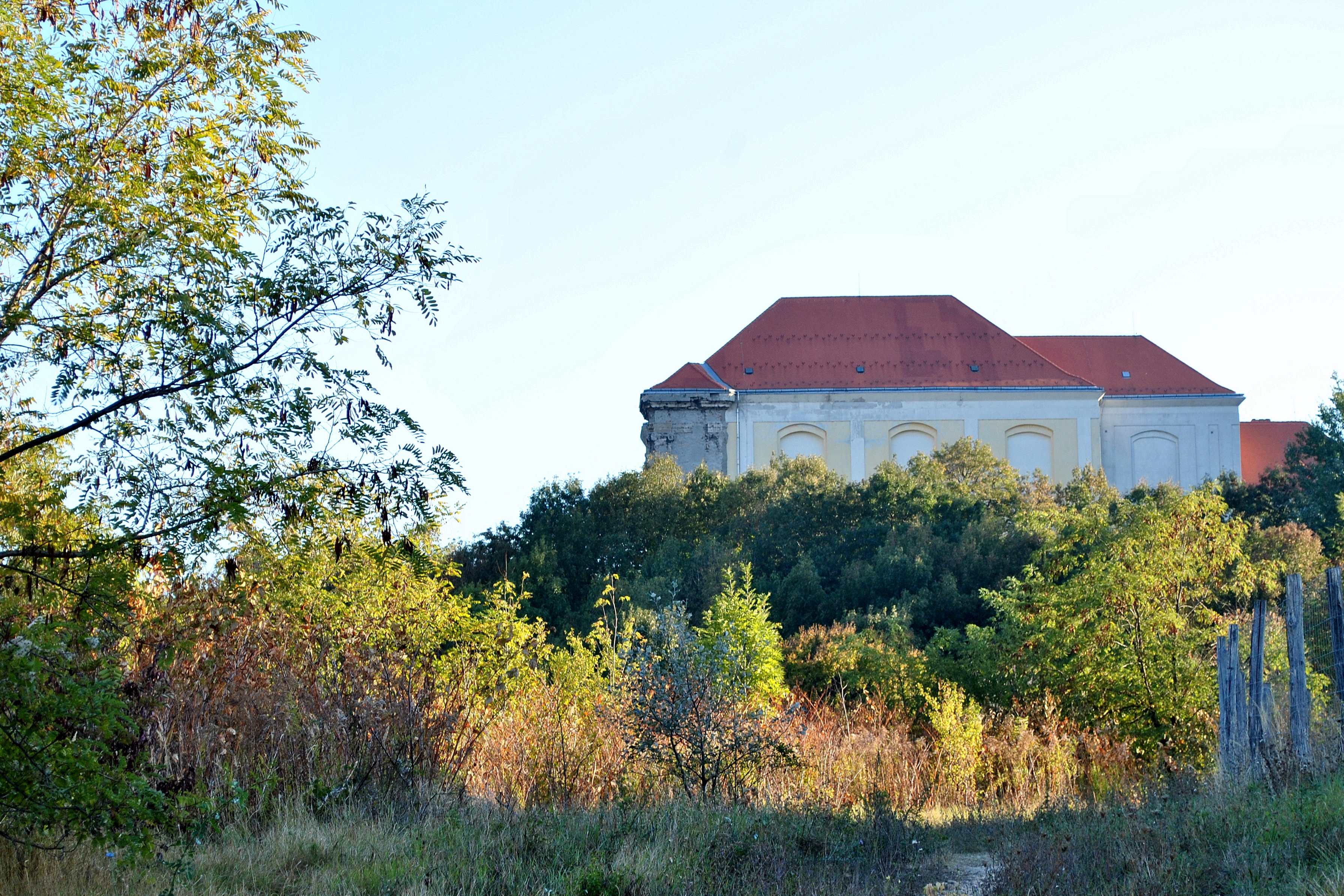 régi trinitárius kolostor (Budapest 3, Kiscelli utca 108., Kolostor utca 33.)